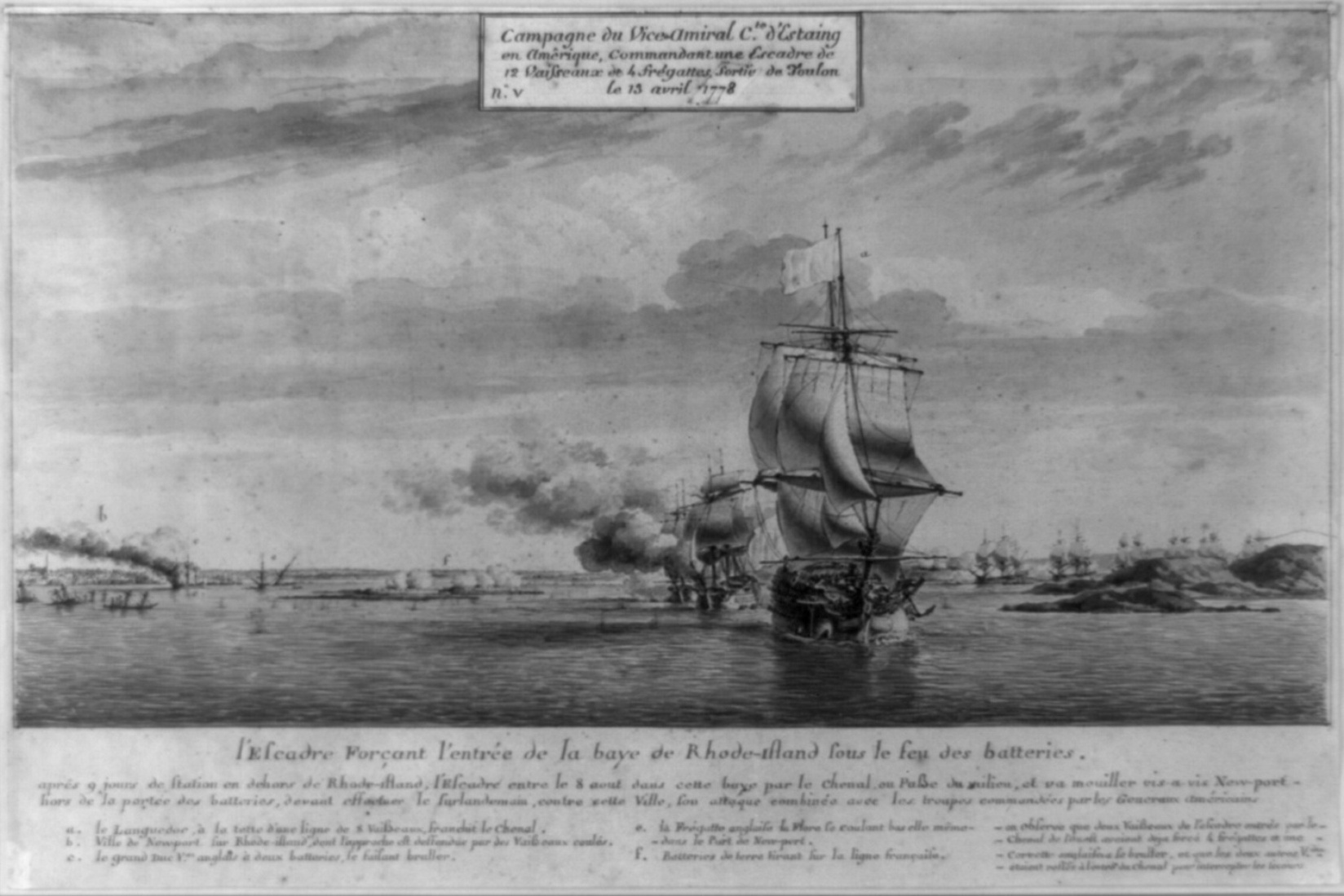 Gravure réalisée en 1778 lors de la campagne de d'Estaing lors de la première année de la Guerre d'Indépendance américaine. Entrance to the French squadron of D'Estaing in the Bay of Newport in 1778 under gunfire English. First year of the French engagement in the American Revolution. (Peter Ozanne)